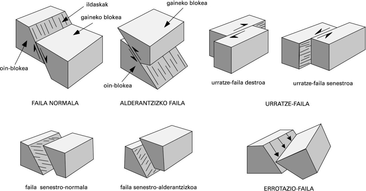 Faila-motak